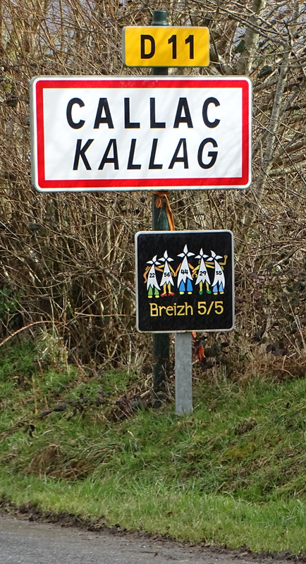 Kallag 22. Panell hent